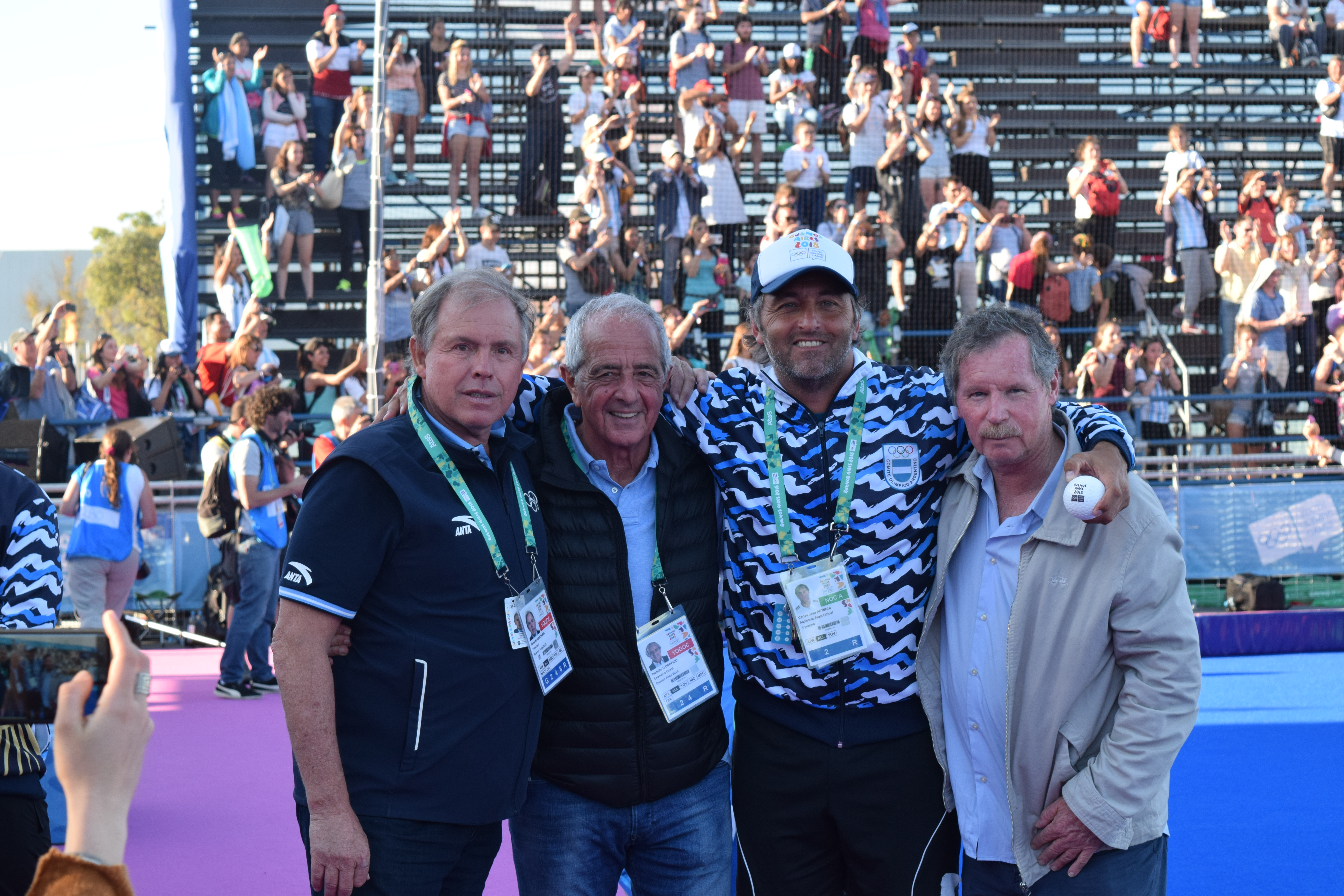 Ceremonia de entrega de medallas enHockey5s femenino durante los Juegos Olímpicos de la Juventud 2018 en Buenos Aires.